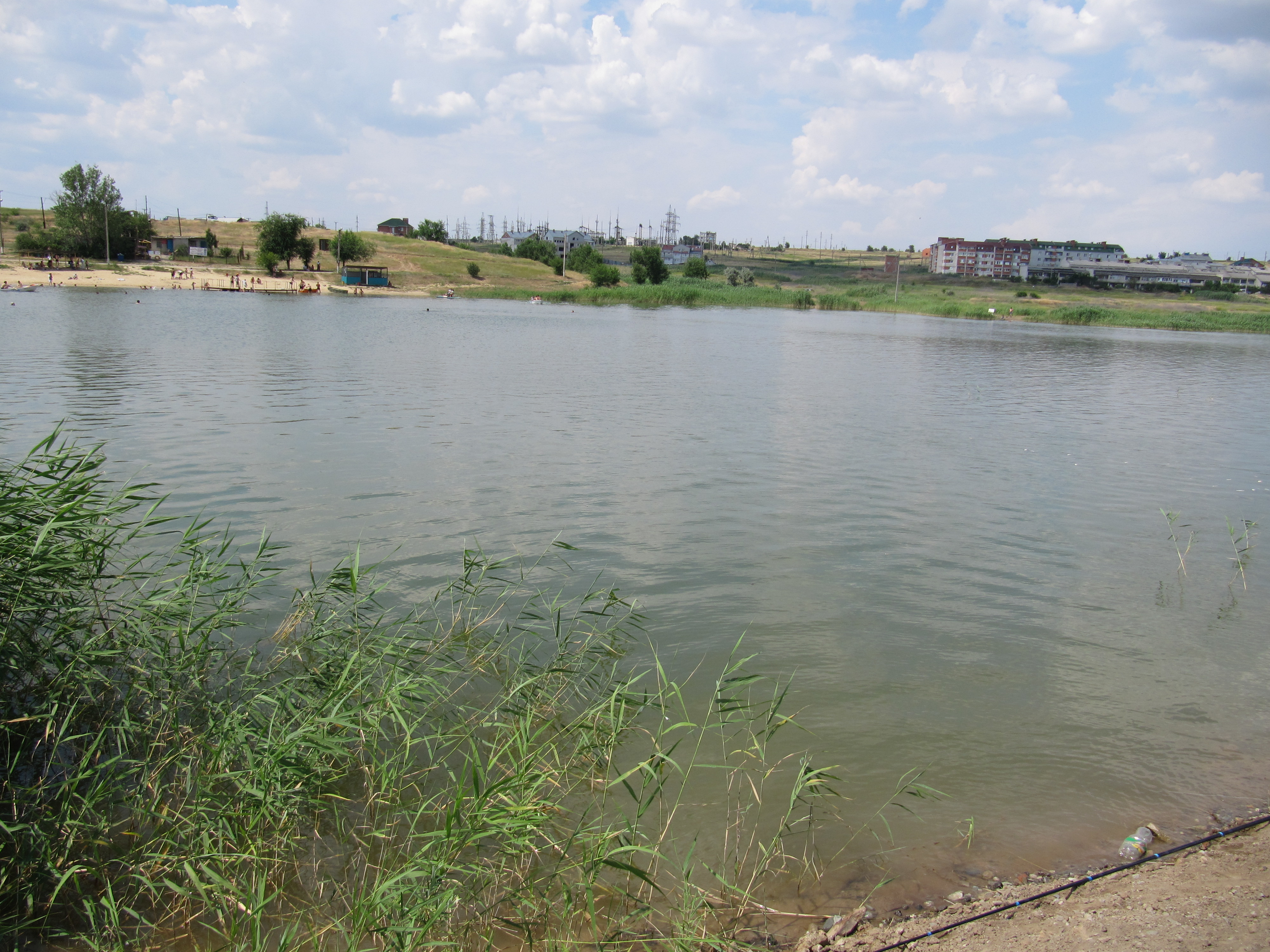 Колонский пруд, Элиста